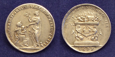 Zilveren penning, Vrede van Rijswijk. Jaartal: 1697